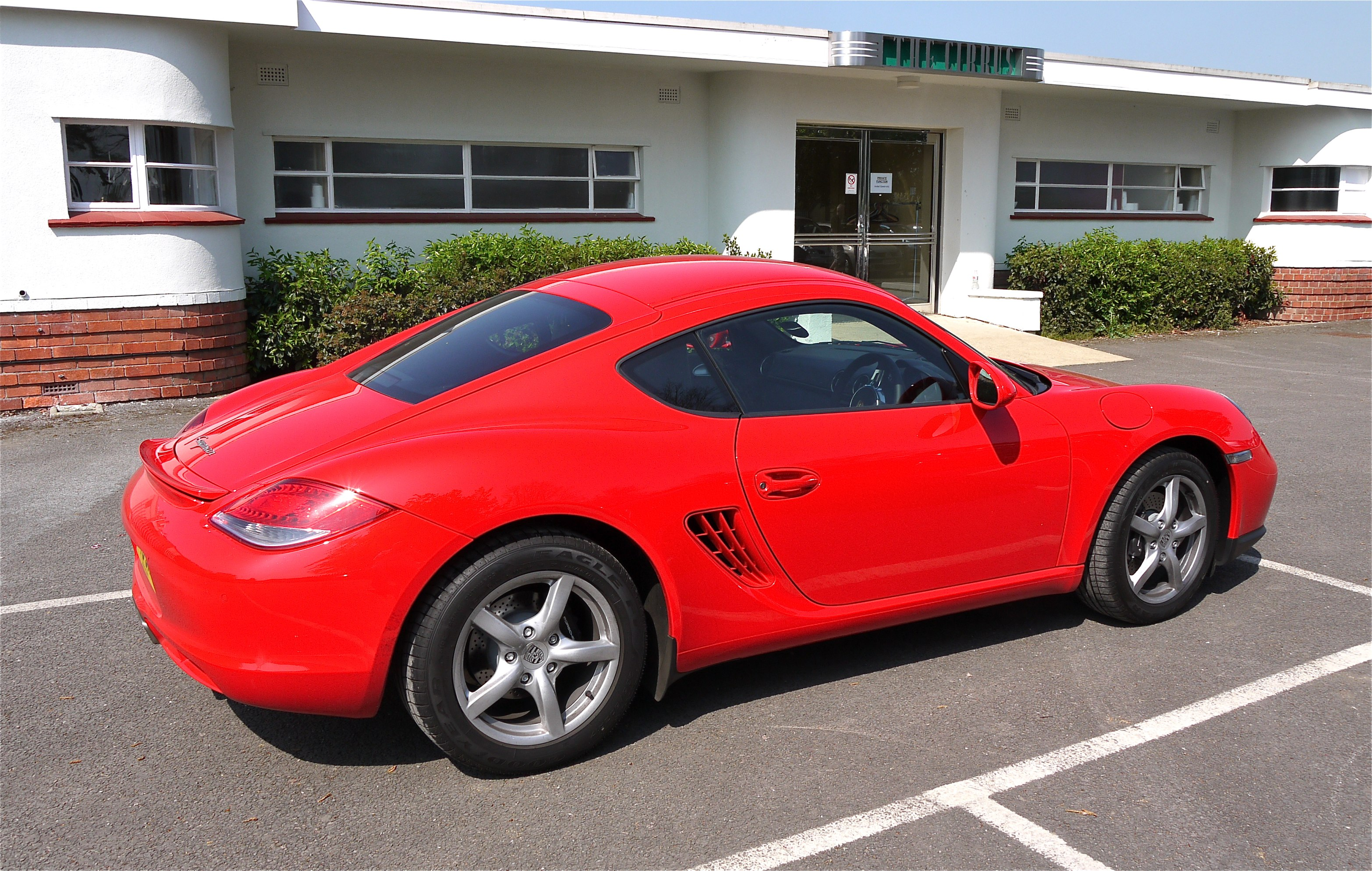 Panasonic G1 14-45 Lens